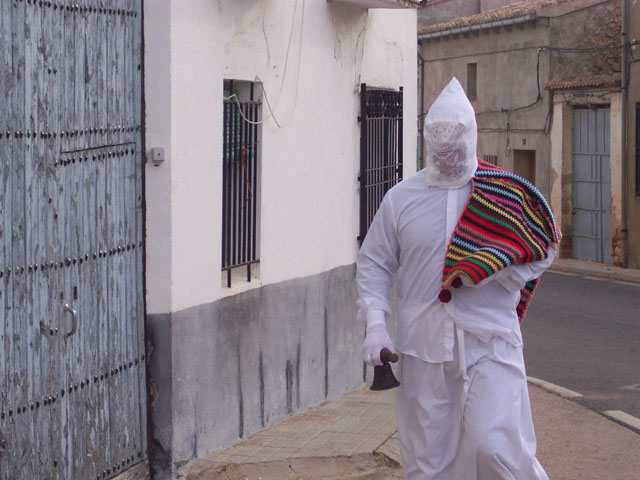 Blanco o Anima Muda de El Ballestero (Albacete)